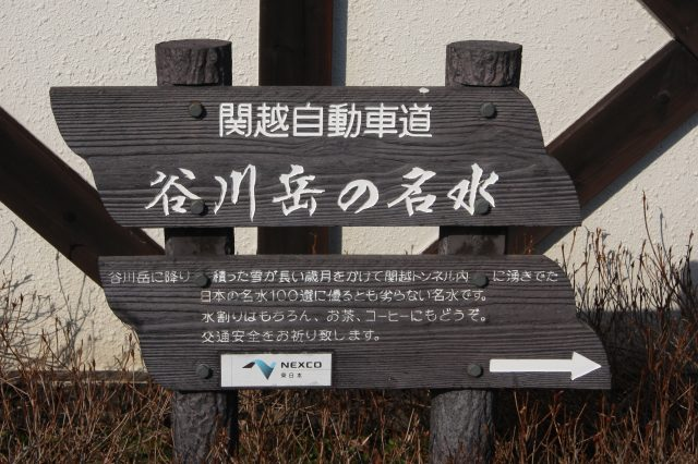 上り線施設内の湧水案内板